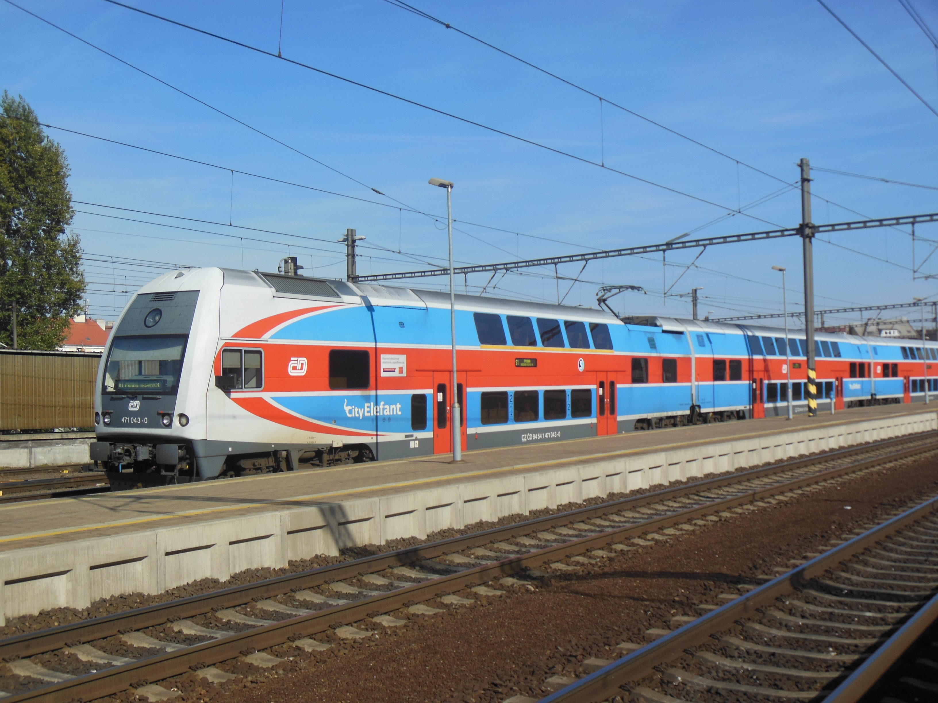 Praha-Vysočany. Železniční stanice Praha-Libeň, elektrická jednotka 471.